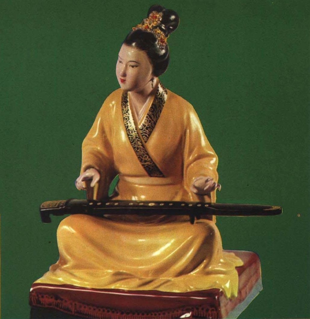 1963-04 1963年 福州漆器